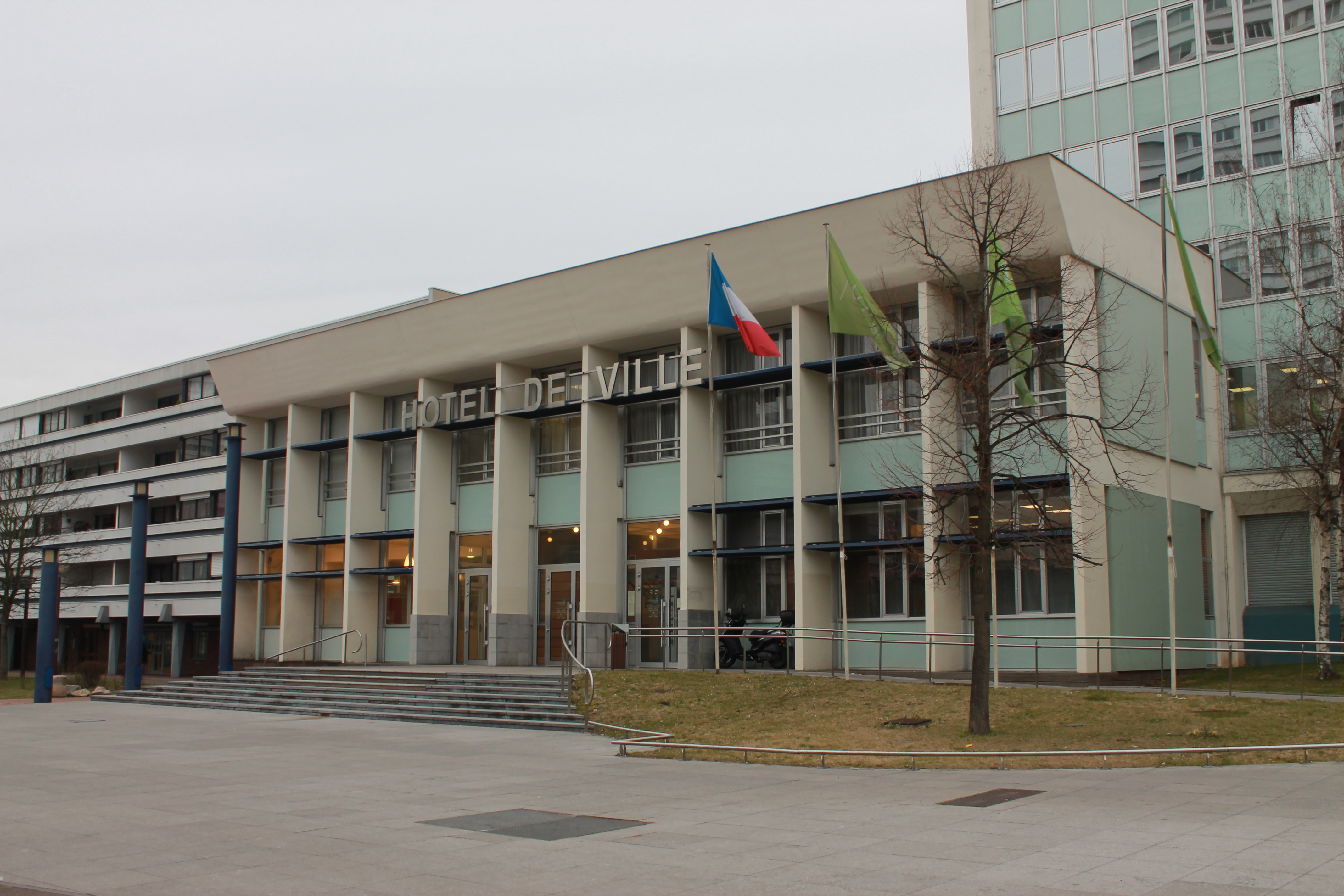 Mairie de la ville de Mons-en-Baroeul. Autrefois située dans le "Haut de Mons", elle a été déplacée en 1976 de manière à être au centre de la commune.